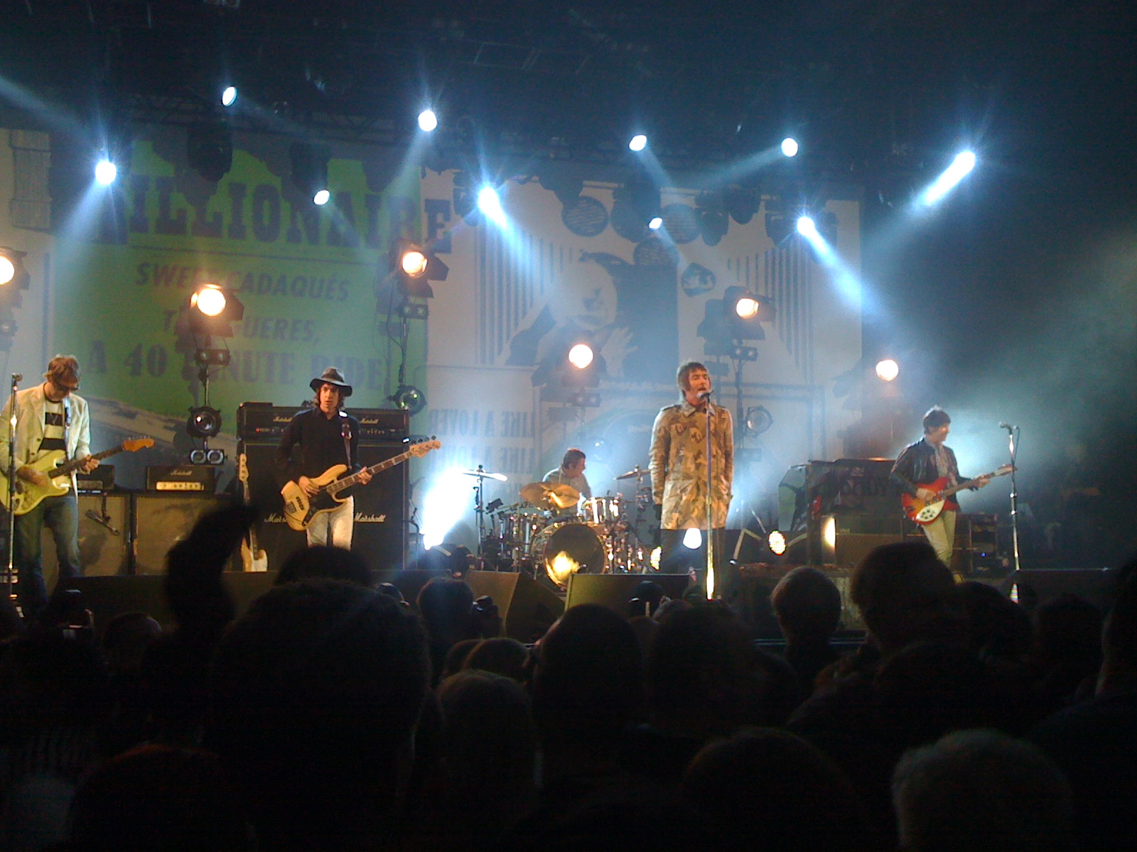 Beadye Eye in der Columbiahalle 2011